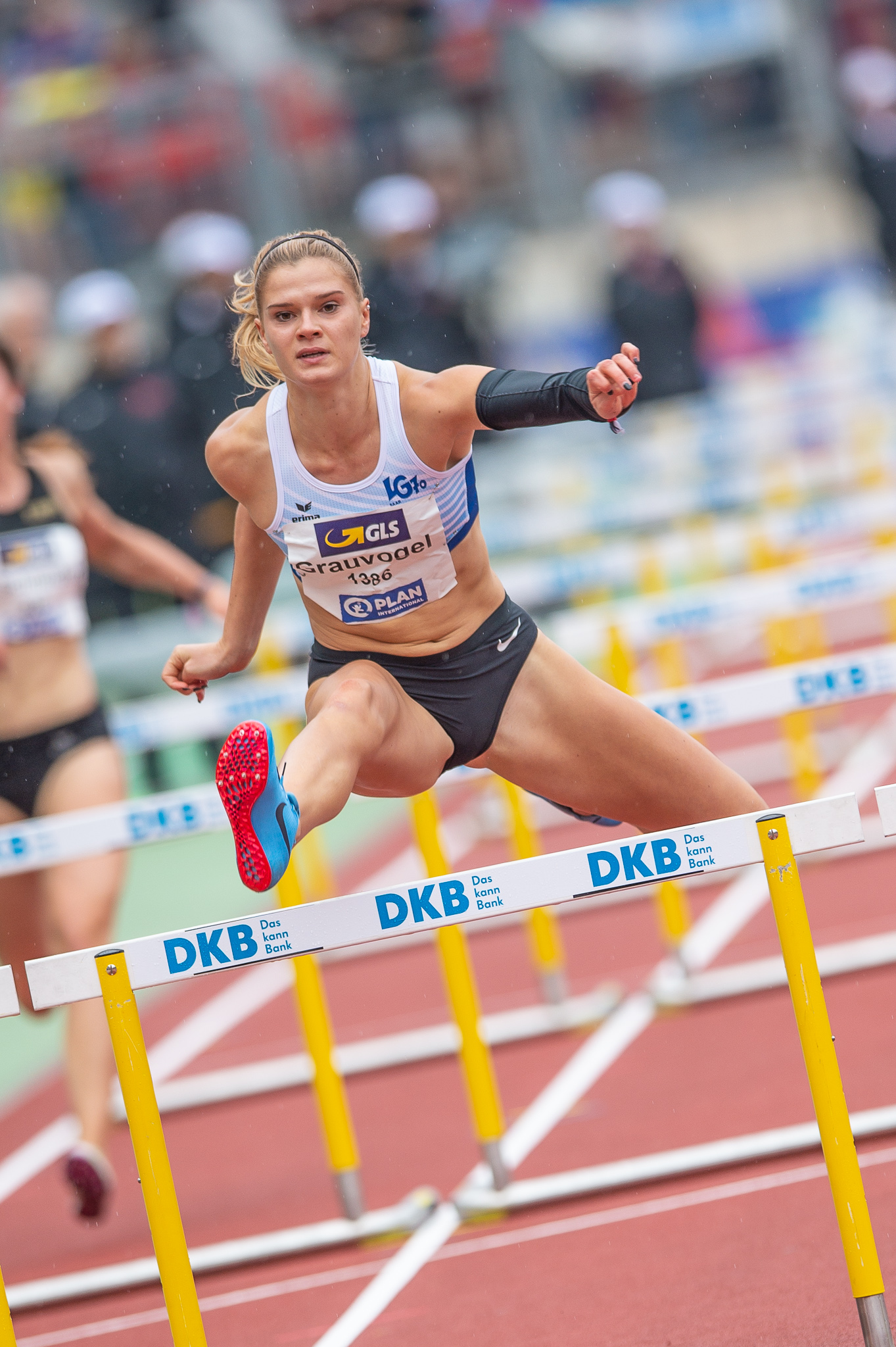 100 metres hurdles,100-Meter-Hürdenlauf,DLV,Deutsche Leichtathletik Meisterschaften 2018,Deutscher Leichtathletik-Verband,LG Saar 70,Louisa Grauvogel,Max-Morlock-Stadion